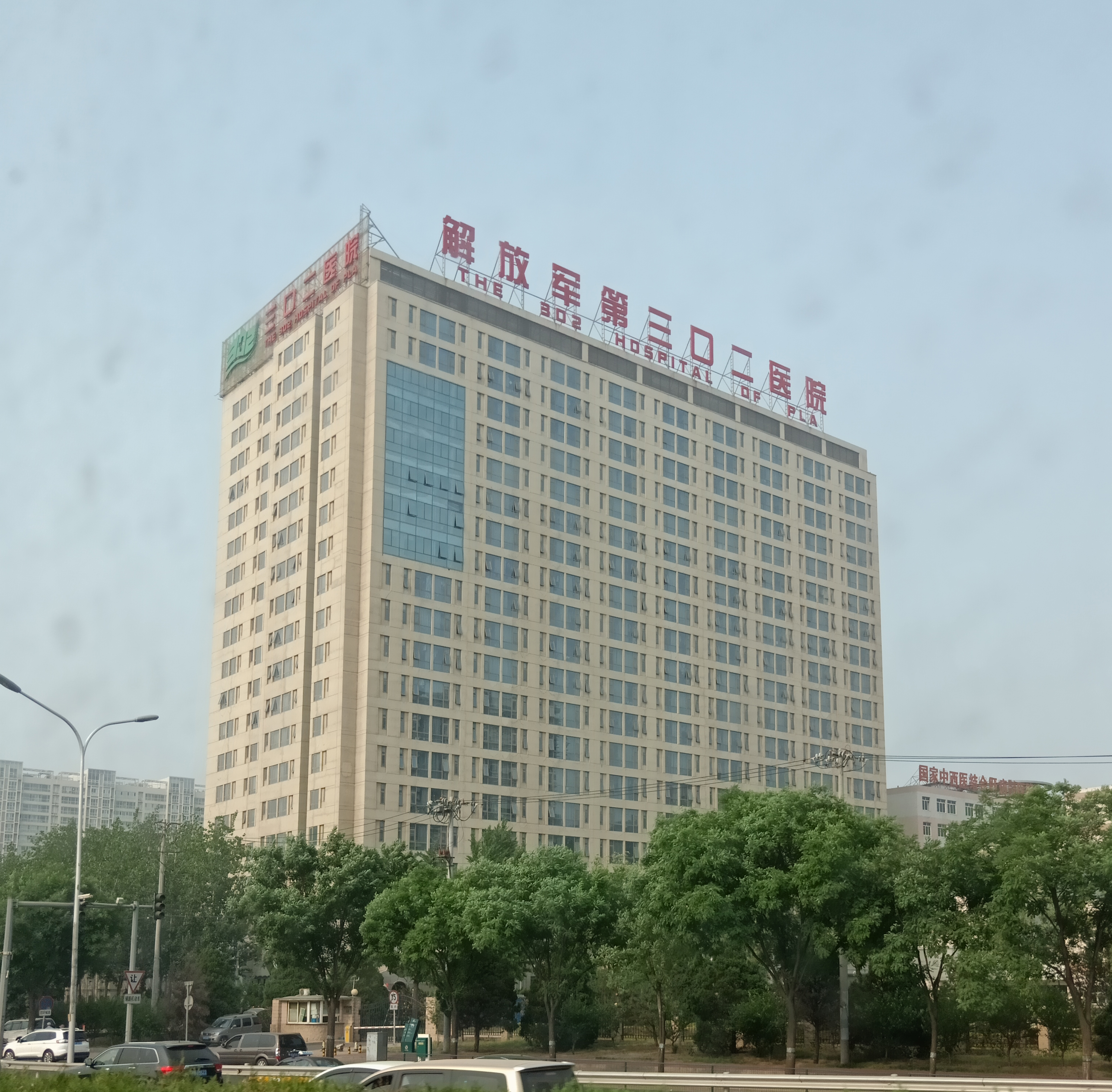 粵語: 中國人民解放軍第三〇二醫院